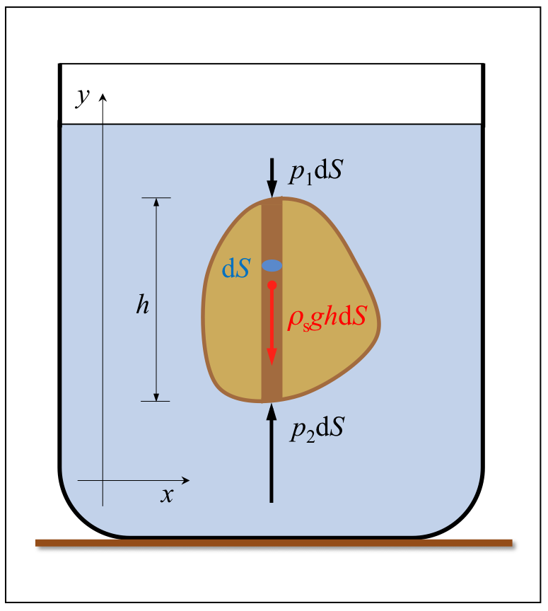 Fluidoaren barnean dagoen solidoak jasaten dituen indar bertikalen eskema.